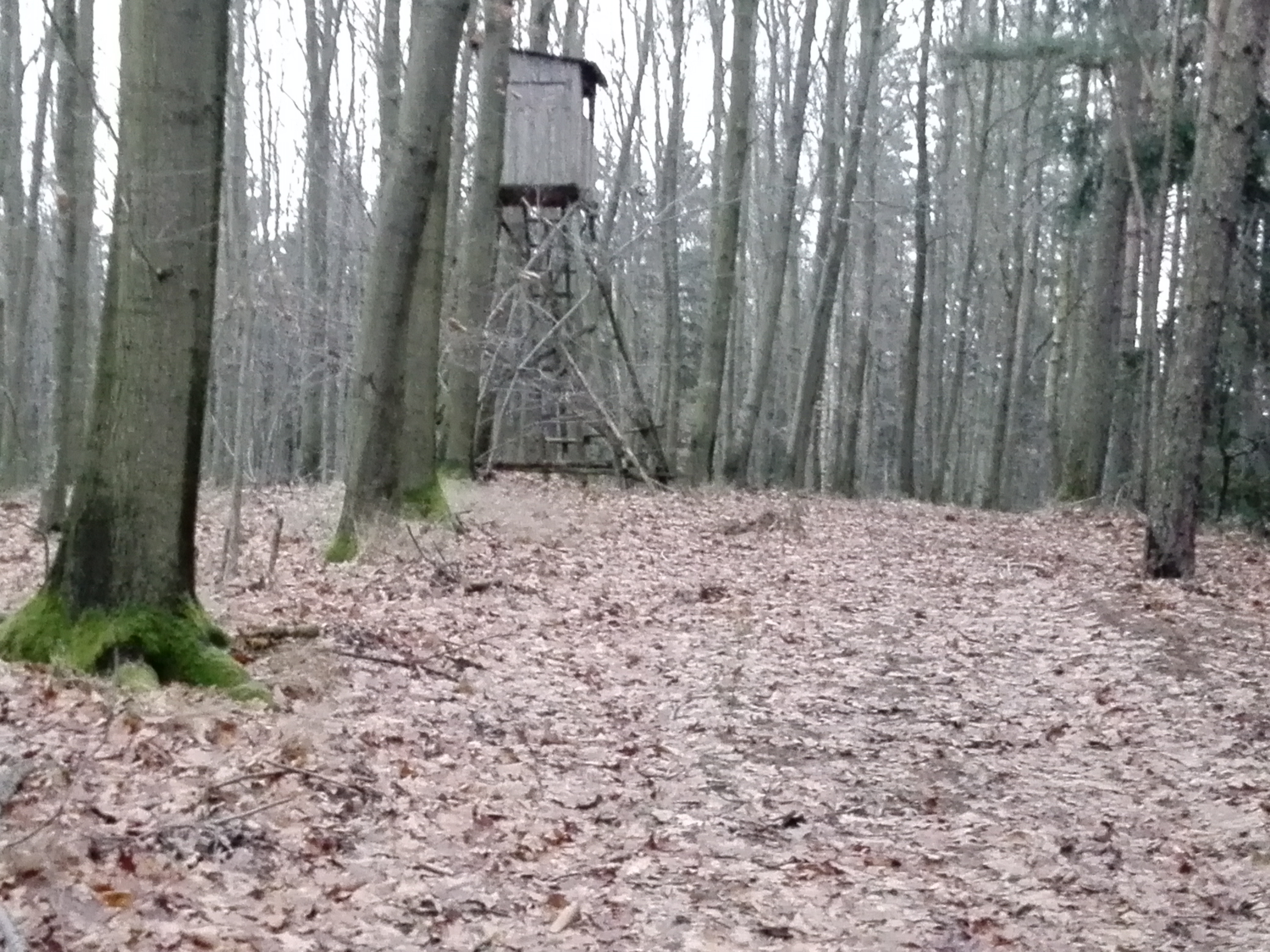 Der Böthchenberg ist ein Gipfel, der vom gleichnamigen Waldgebiet umschlossen wird, er misst 401,1 Meter